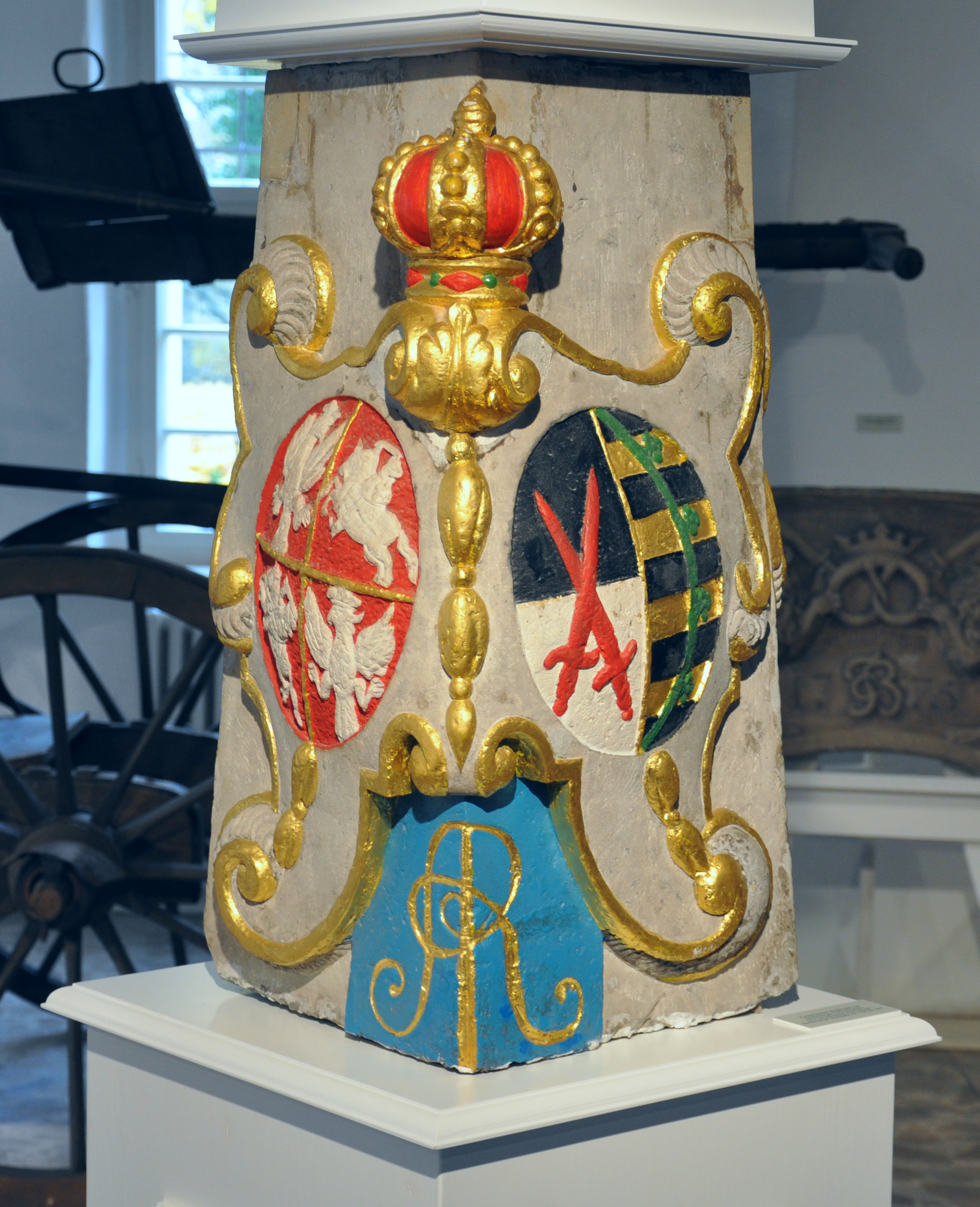 Museum Senftenberg (im Schloss Senftenberg) Sächsische Postmeilensäule von 1731 mit den Wappen der Personalunion Polen/Sachsen, 1847 abgebaut, Fragment des Originals (seit 2000 steht eine Kopie auf dem Marktplatz)